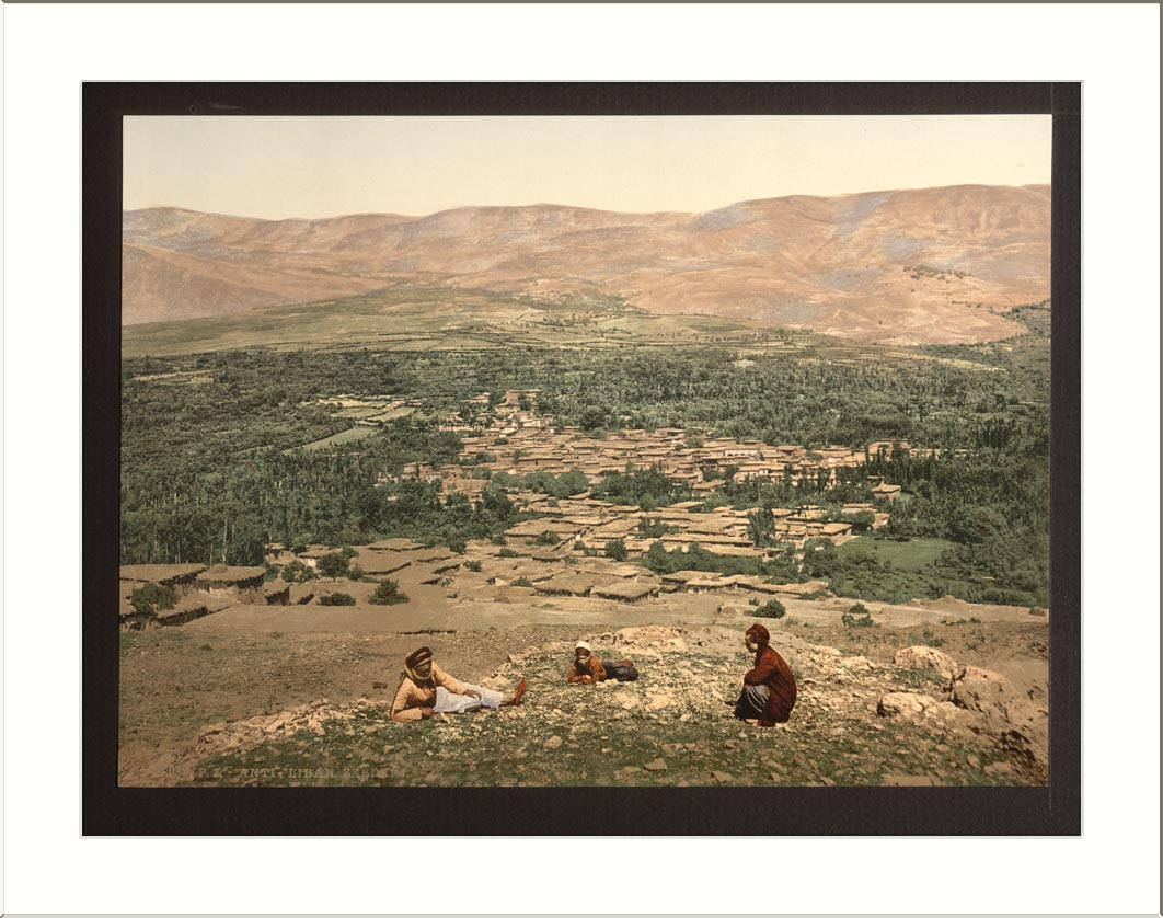 General view Zebdany (i.e. Az-Zabdani) Syria